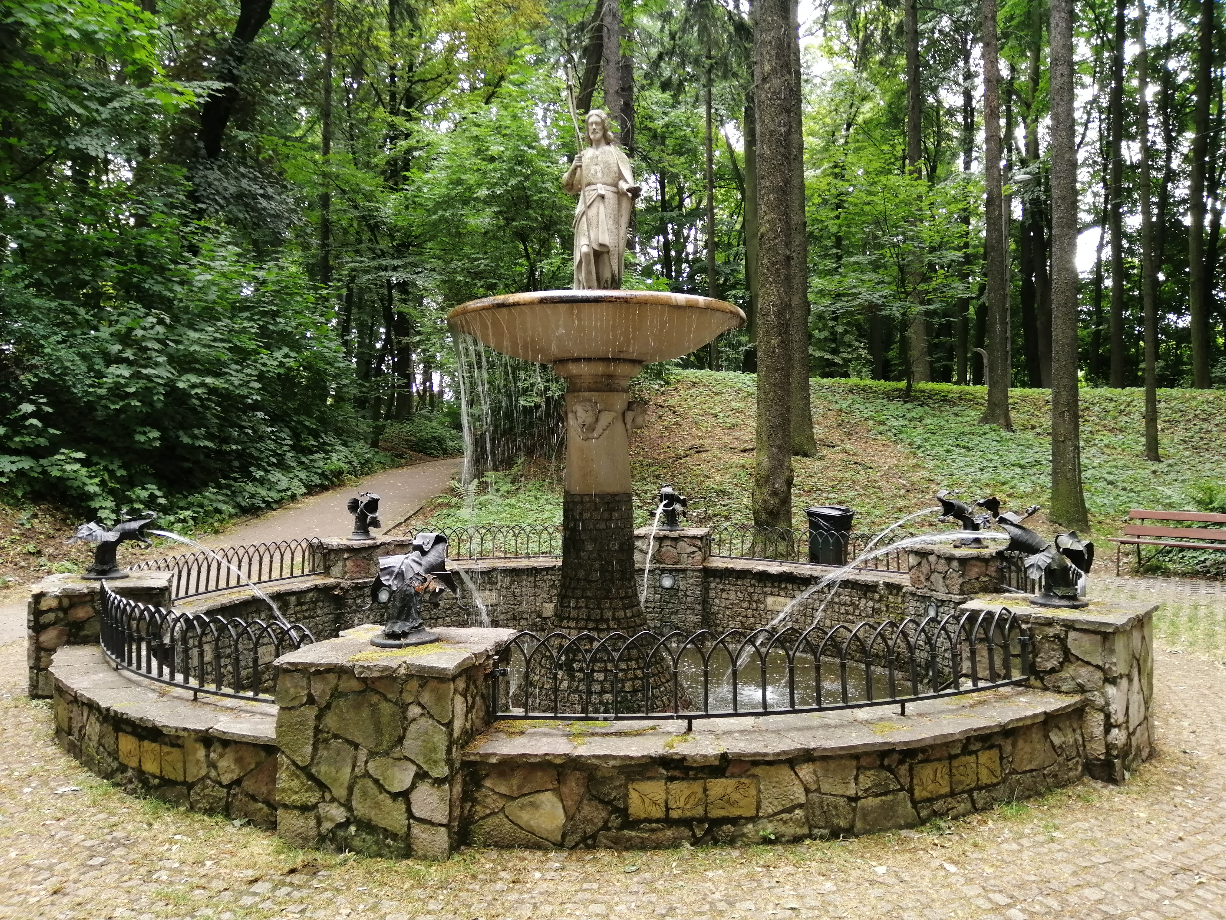 Park Ojców Kamilianów w Tarnowskich Górach - fontanna